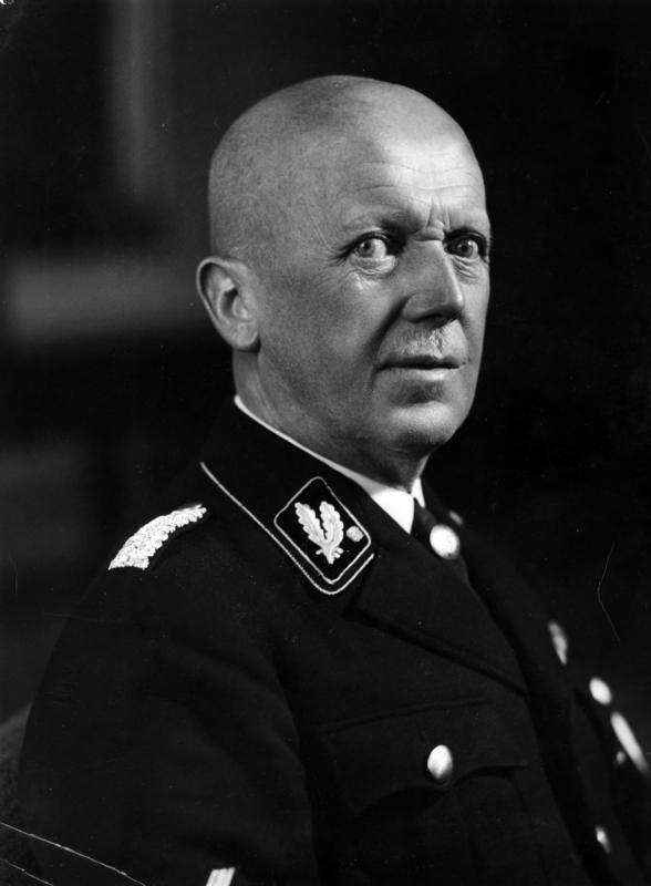 Hans Heinrich Lammers Reichsminister und Chef der Reichskanzlei Dr. Hans Heinrich Lammers. Foto Dorneth 1.12.37 [Porträt Reichsminister und Chef der Reichskanzlei Hans Heinrich Lammers in SS-Uniform als SS-Brigadeführer] Abgebildete Personen: Lammers, Hans-Heinrich Dr.: Reichsminister, Chef der Reichskanzlei, Deutschland